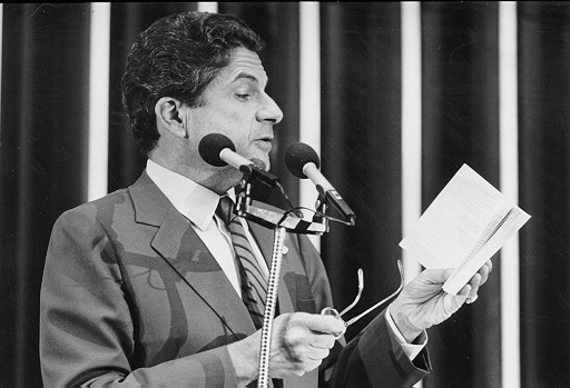 Afonso Camargo, paranaense, foi senador por duas vezes – o primeiro mandato foi durante a ditadura militar e depois como senador eleito, entre 1979 e 1987.Foto: Célio Azevedo/Agência Senado